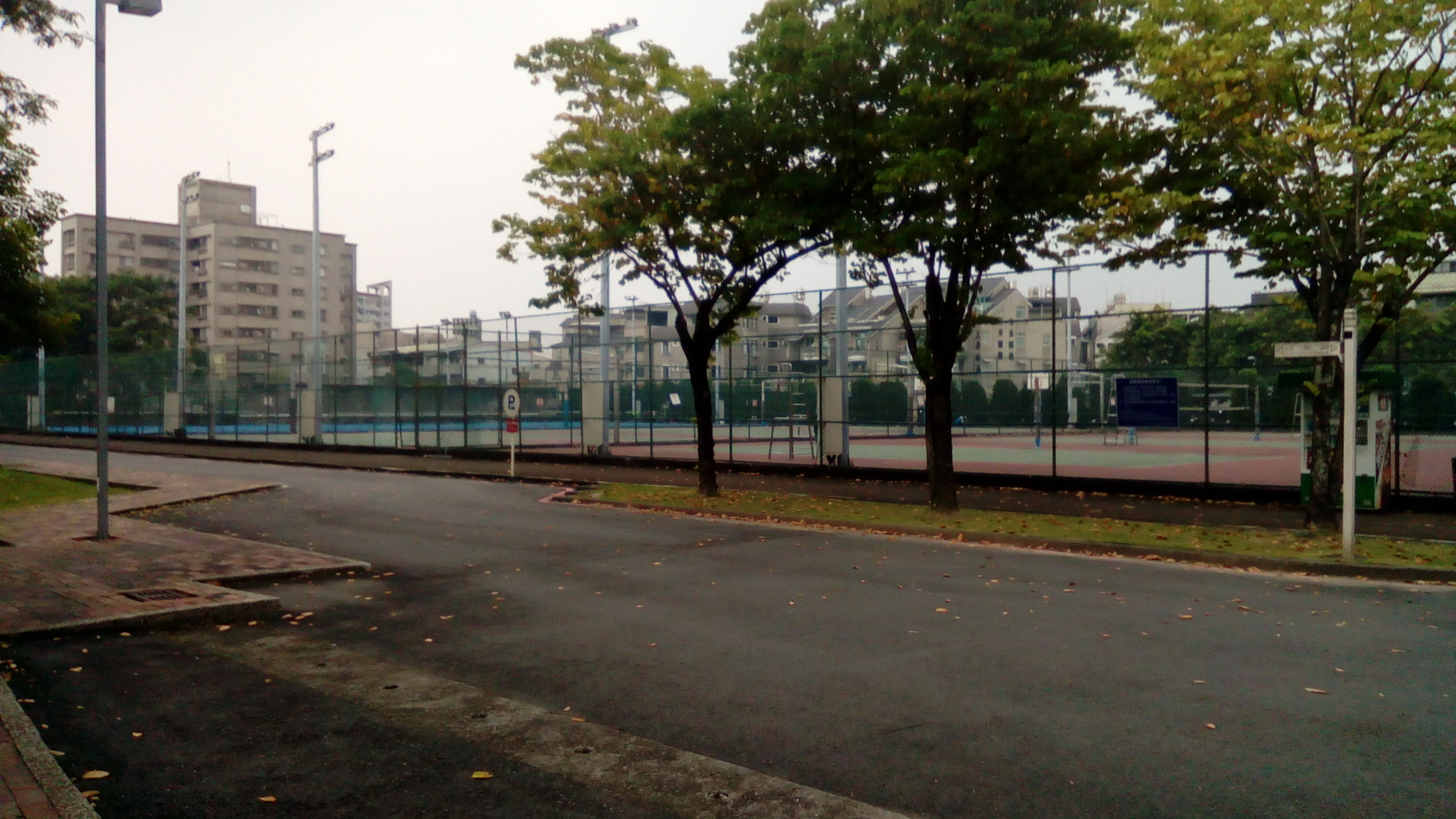 位於民生校區東北側